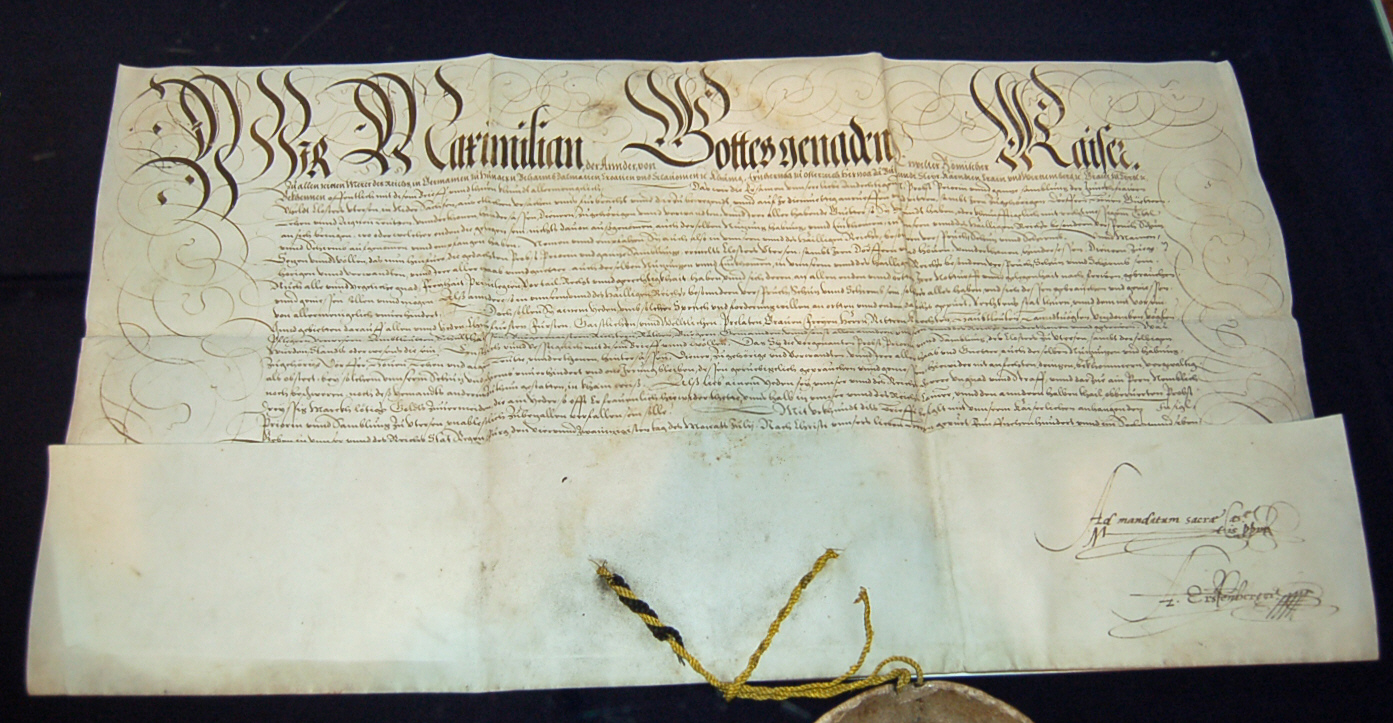 Schutzbrief des deutschen Kaiser Maximilian II aus dem Jahr 1576 und bestätigt nach der Reformation das sämtiche Rechte des Klosters Uetersen beibehalten werden. Die Urkunde trägt die eigenhändige Unterschrift des Kaisers im Falz.